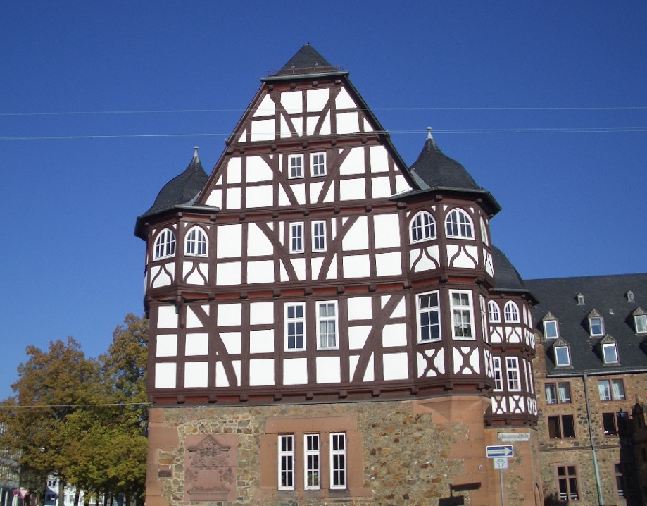 Gießen. Neues Schloss, Ansicht vom Brandplatz aus, optimiert